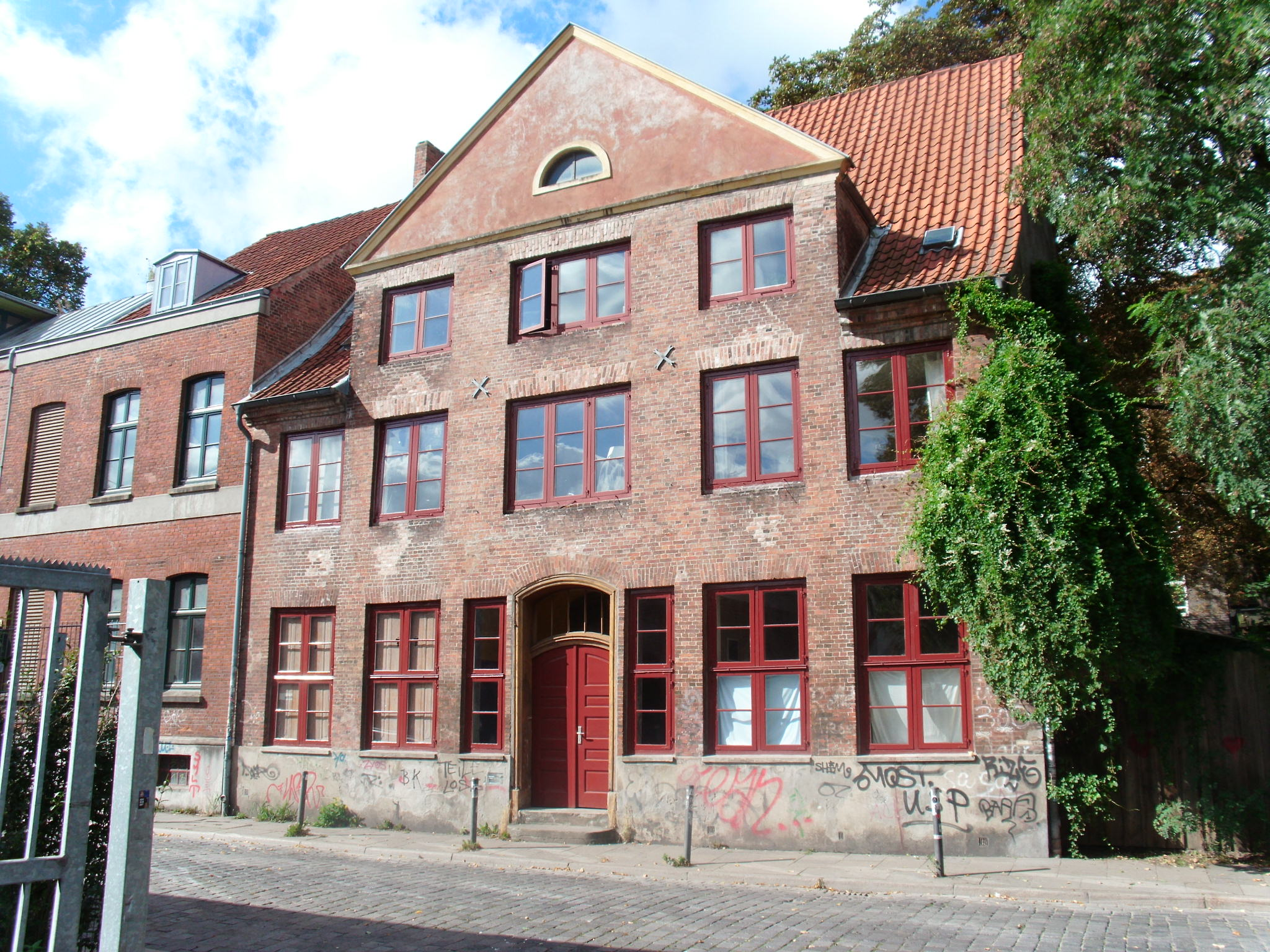 Im 18. und 19. Jahrhundert von den Mennoniten erbaute Gebäudegruppe und zusätzlich als eigenständiges Baudenkmal Große Freiheit 75, ehemaliges Pfarrhaus der Mennoniten aus dem 18. Jahrhundert.This is a photograph of an architectural monument.